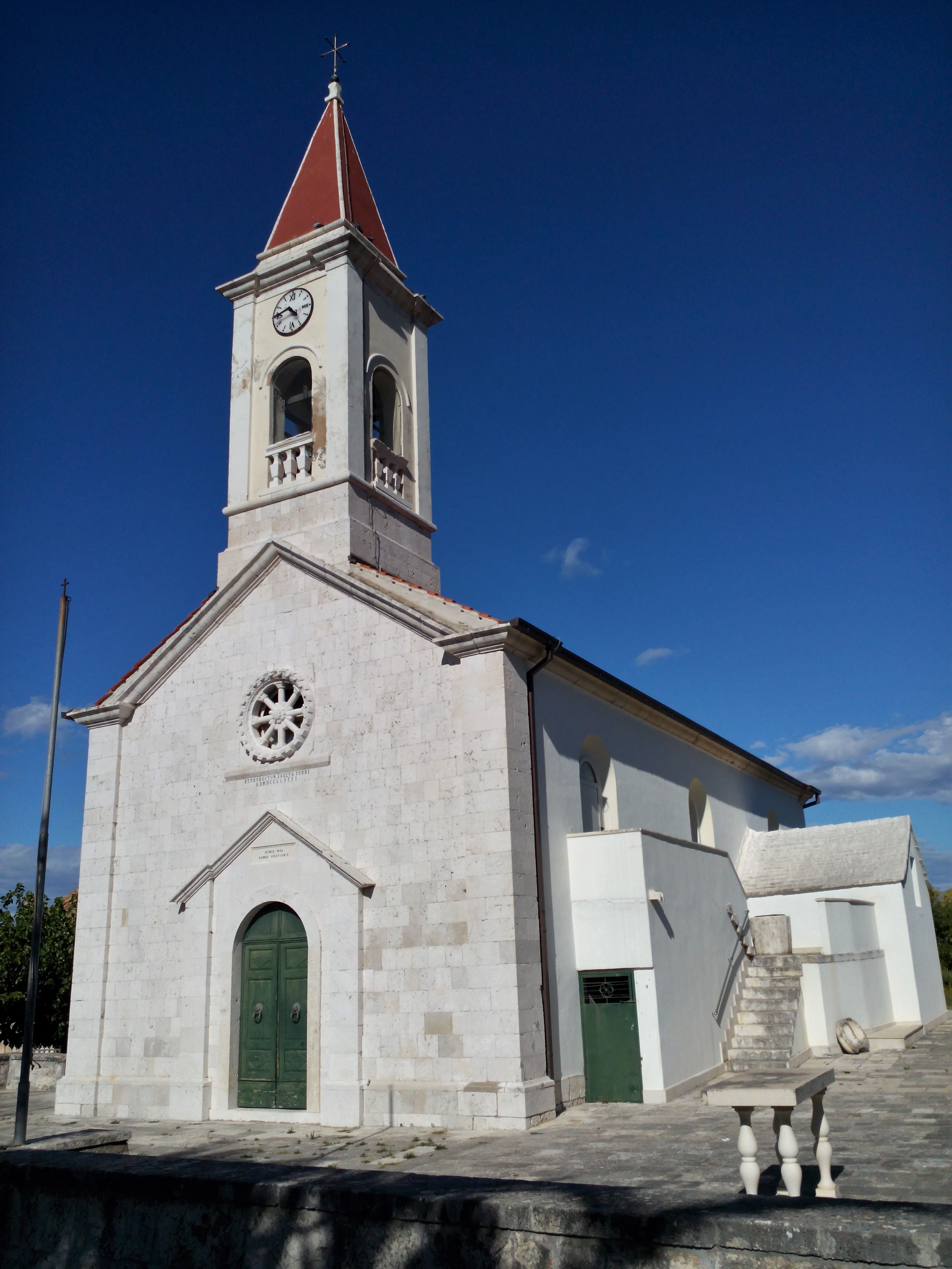 Župna crkva Pohođenja Blažene Djevice Marije u Mircima.